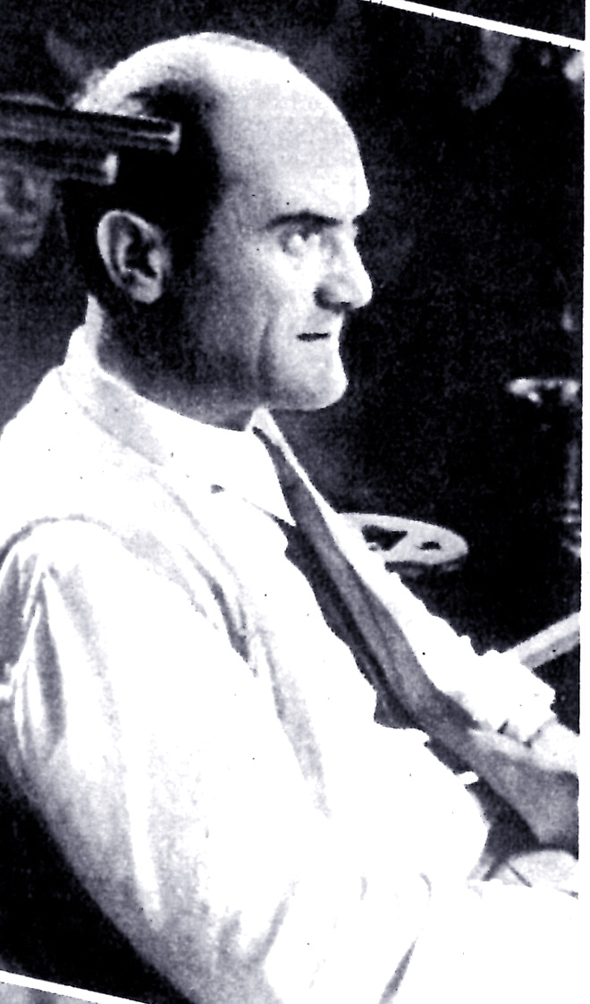 IL regista D'Errico (1902-1941) in una foto del 1937